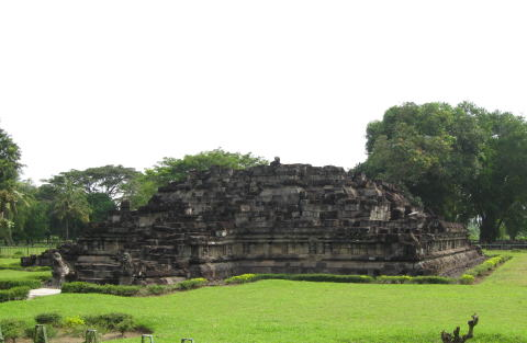 Candi Bubrah ロロ・ジョングラン寺院公園の敷地内にある、チャンディ・セウの南側守護寺院